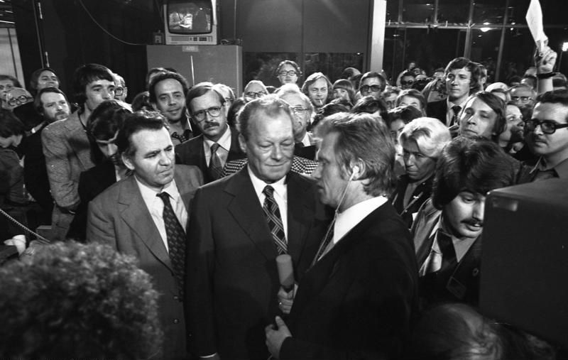 Bundestagswahl - Wahlnacht in der SPD - Bundesgeschäftsstelle